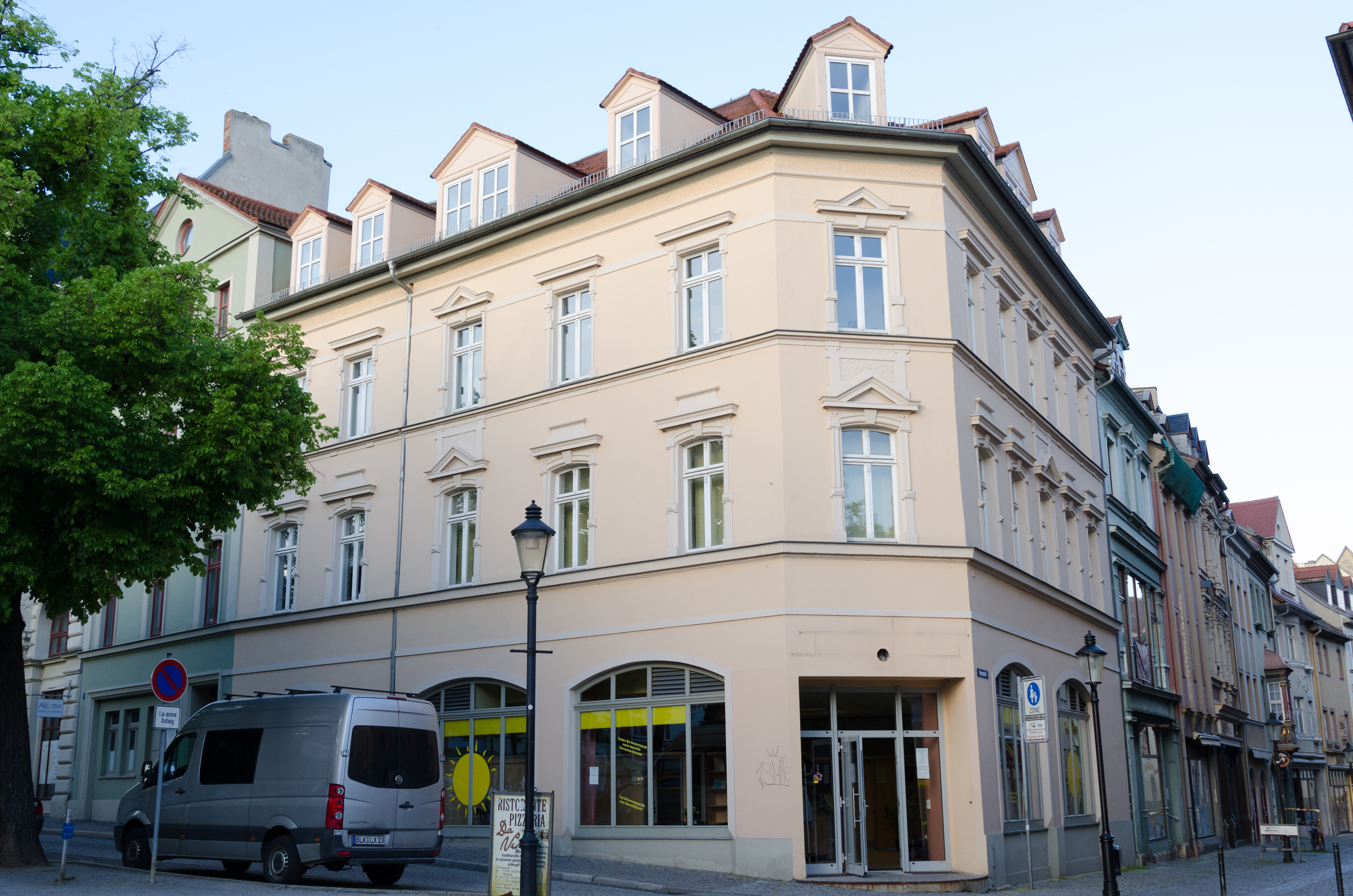 Naumburg, Lindenring 15